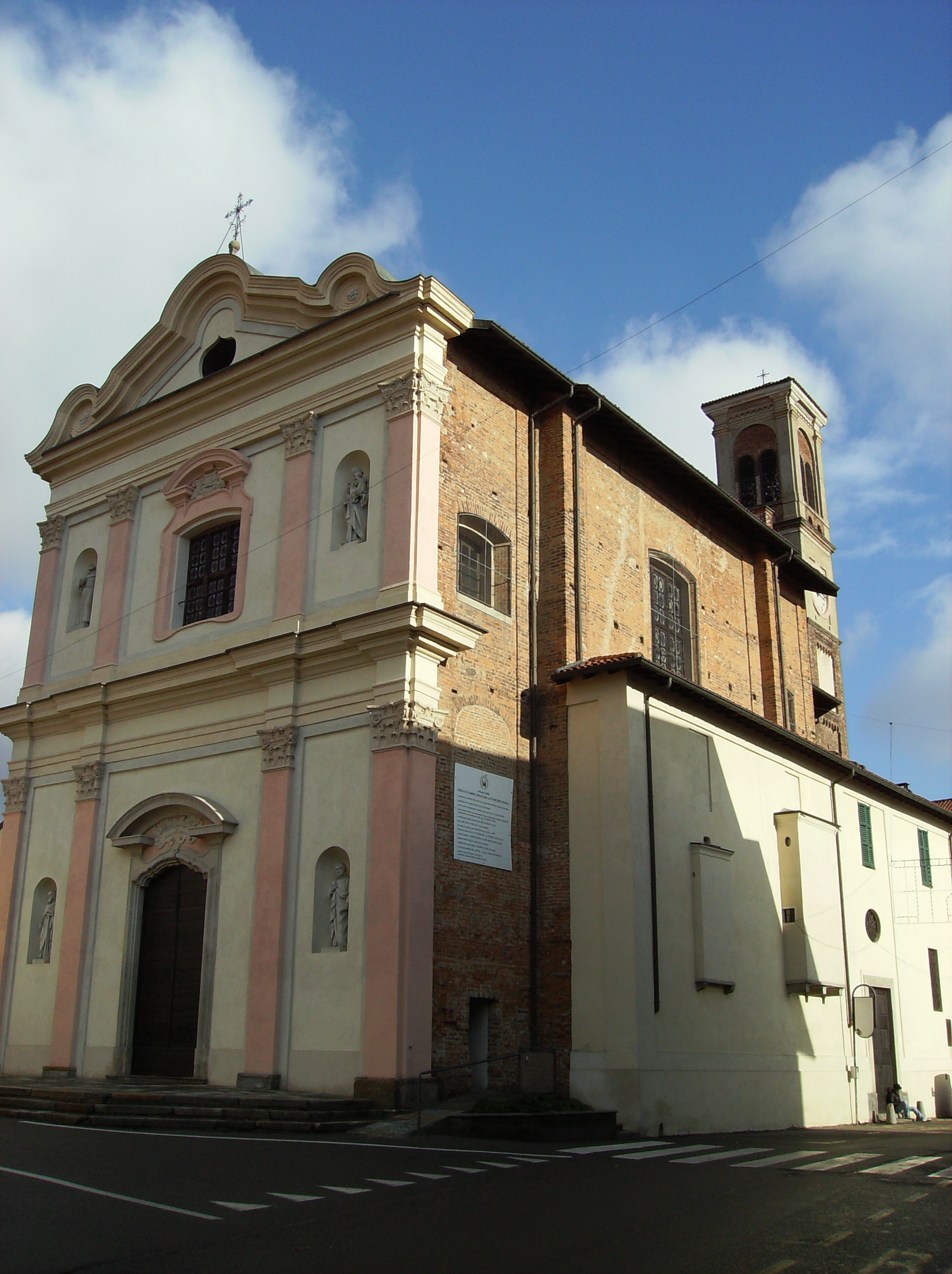 ChiesaVecchiaSacconago